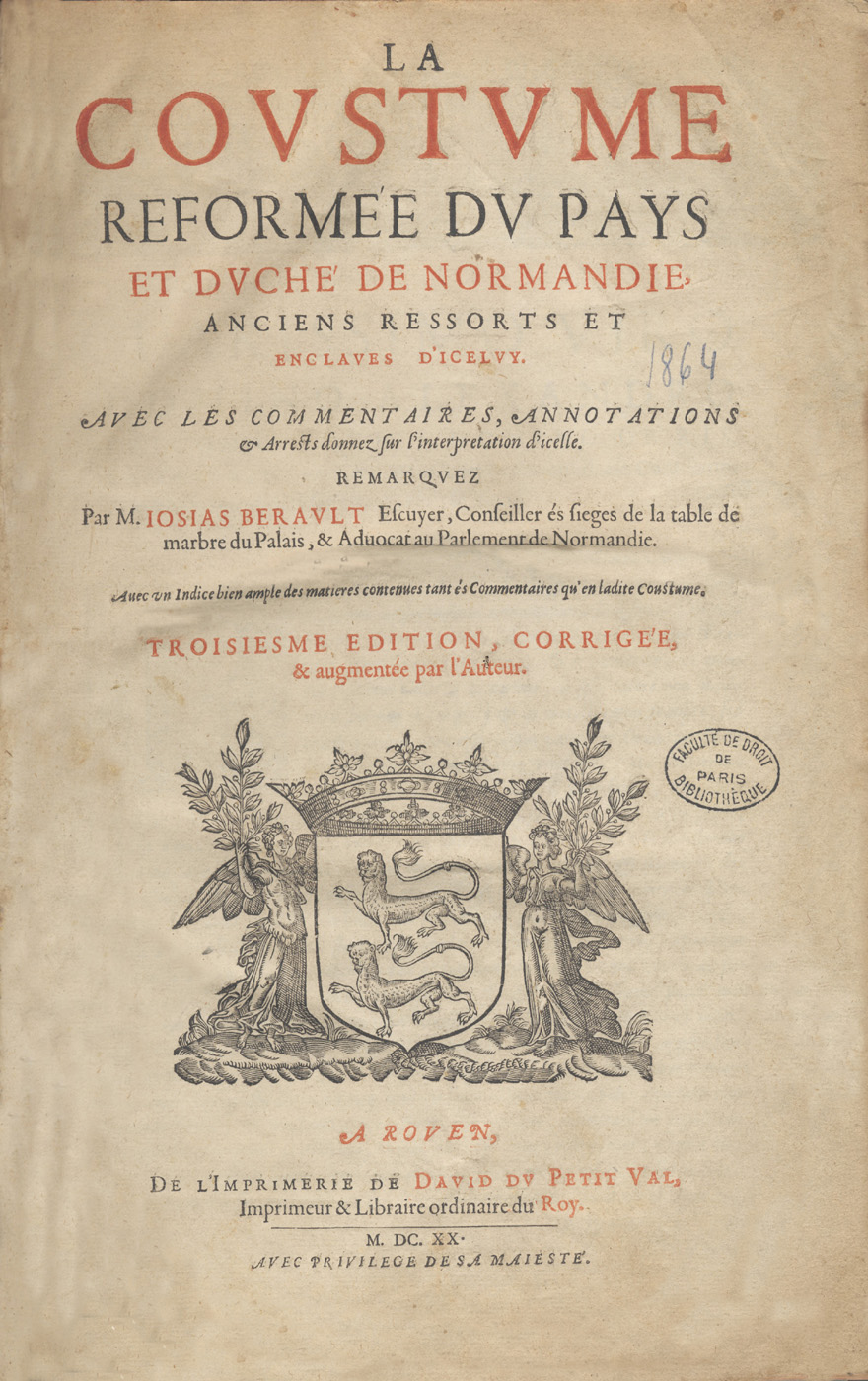 Coustume réformée du pays et duché de Normandie